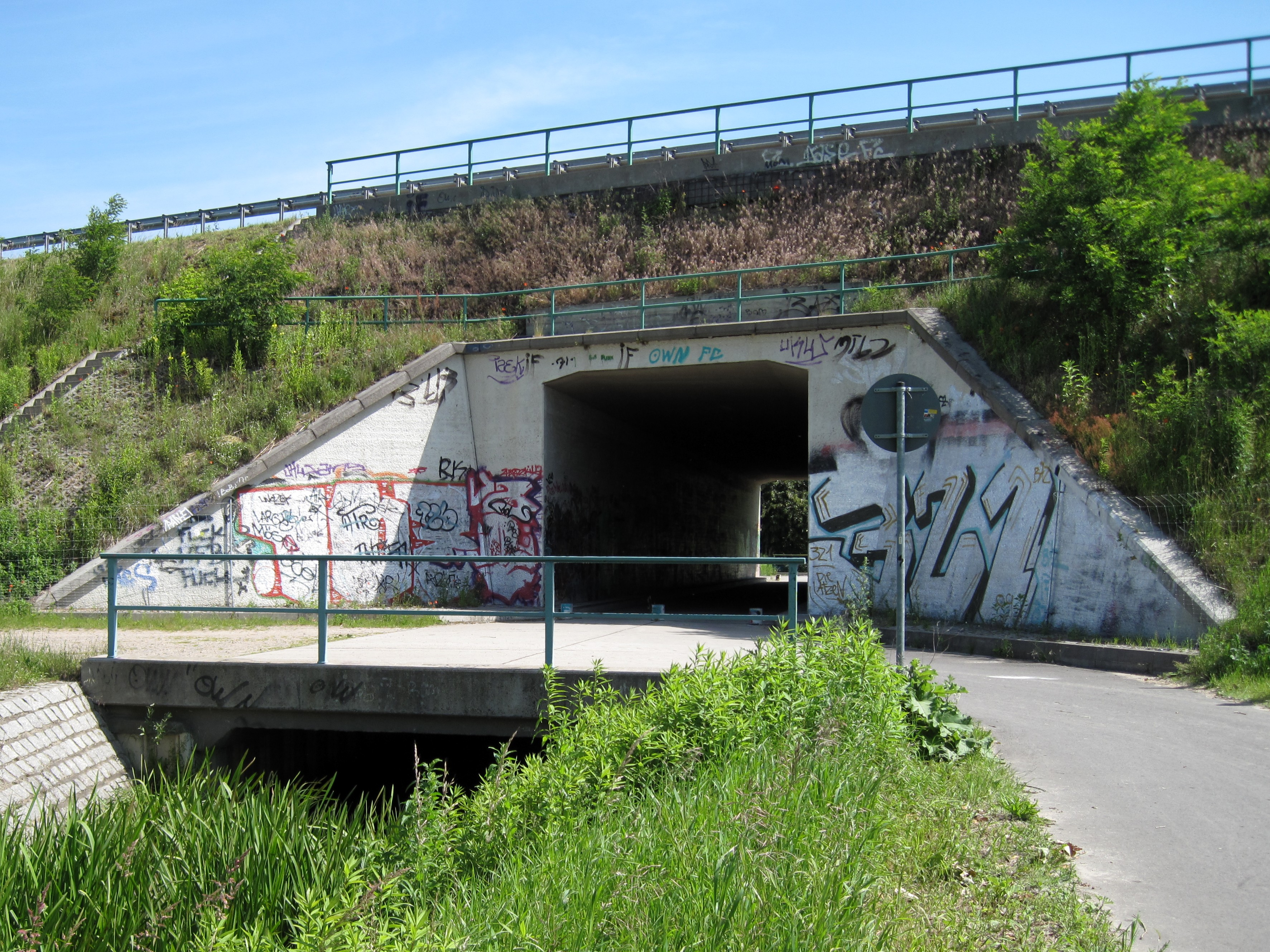 Durchfluss der Panke (Westseite) unter der Bundesautobahn 11 in Bernau